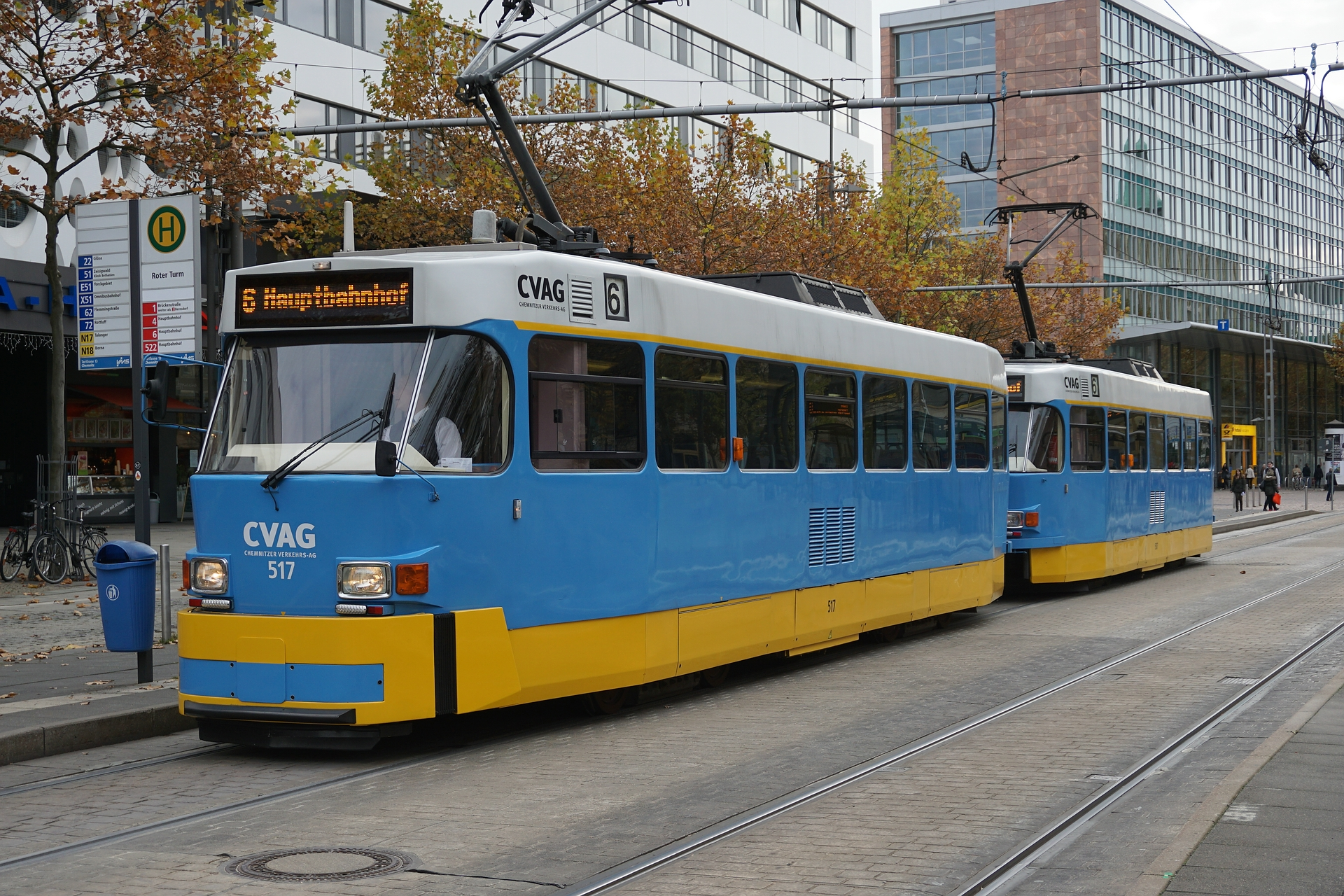 Triebwagen Tatra T3D-M und Beiwagen Tatra B3D-M an der Straße der Nationen in Chemnitz